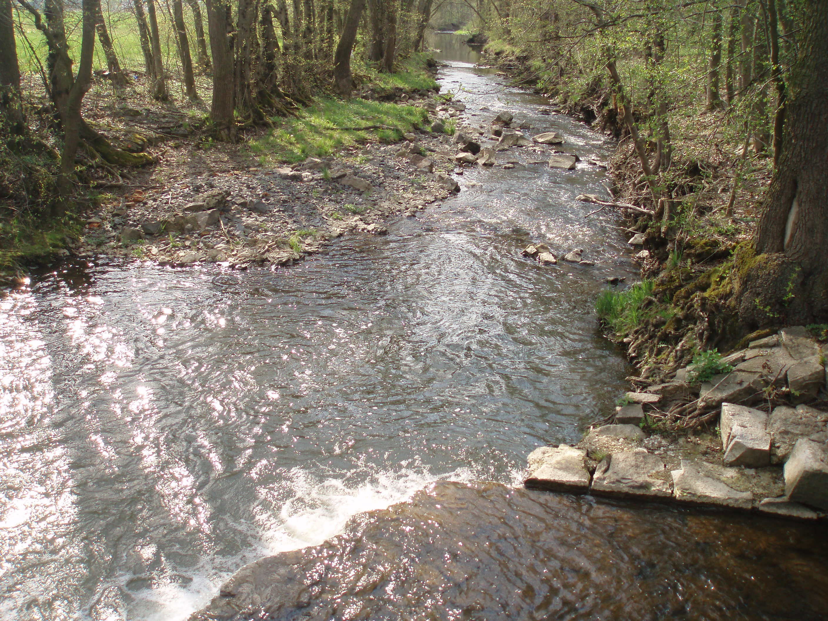 Tok říčky bradavy, foceno z okraje jednoho z regulačních bazénů na toku řečky.